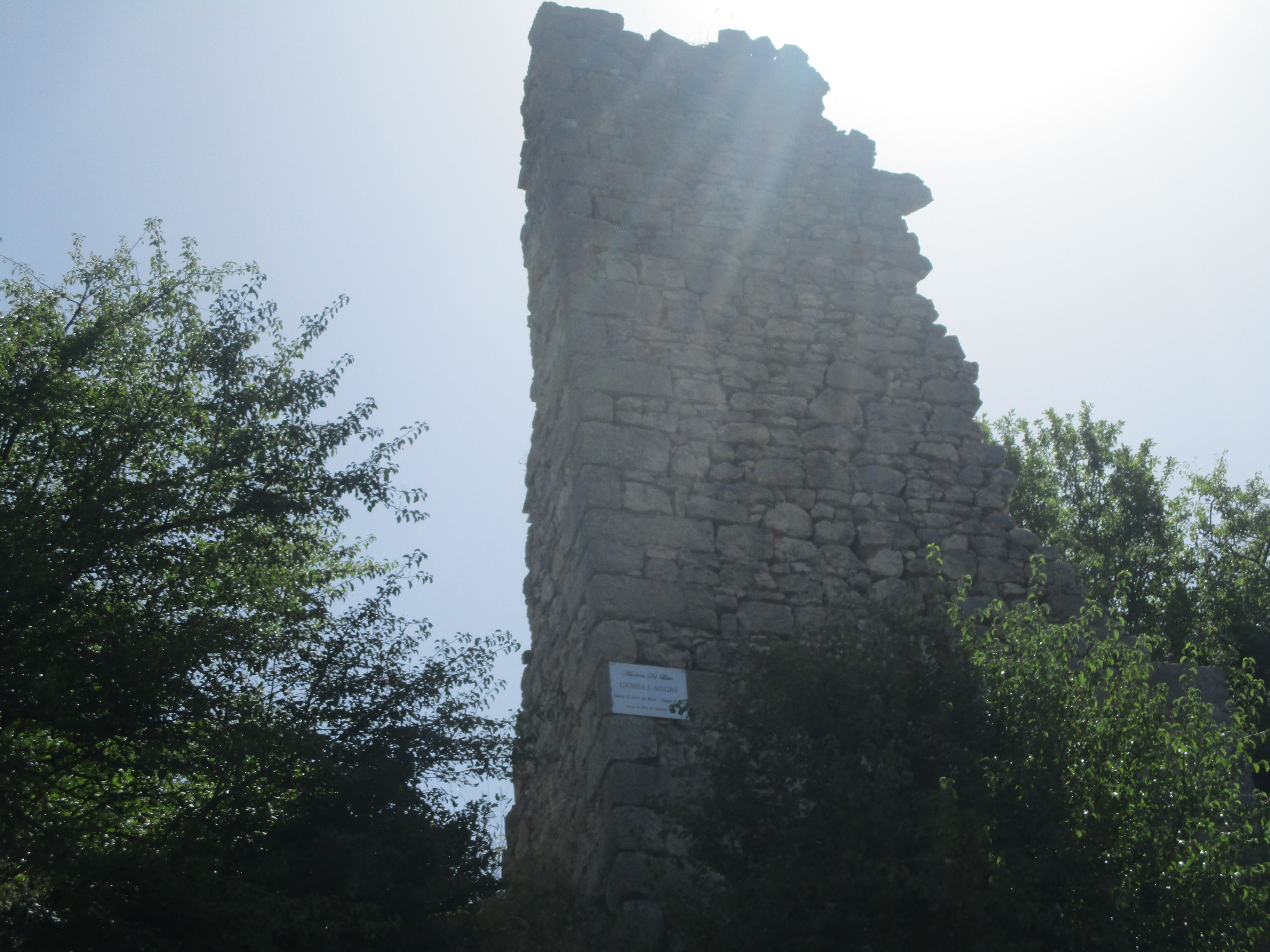 Casa natale di Andrea De Litio